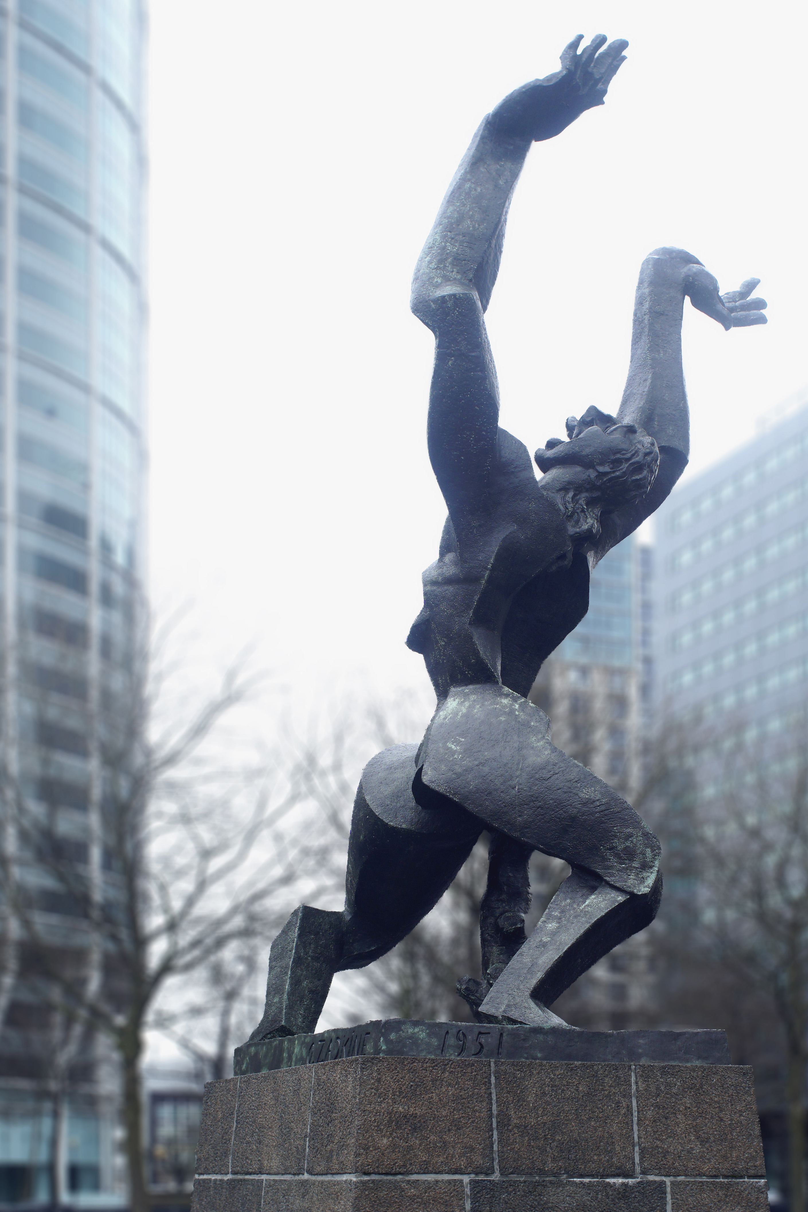 De Verwoeste Stad (The Destroyed City) in rainy days.